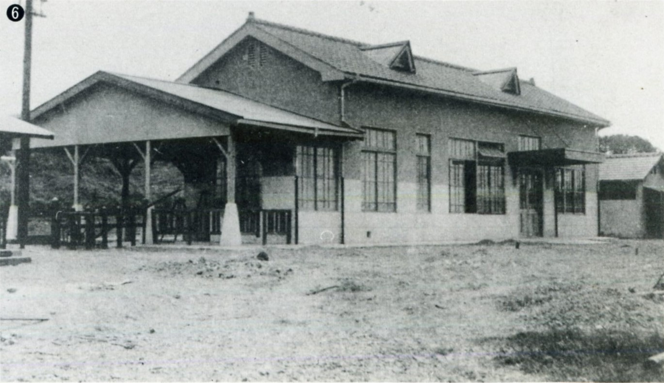 開業当時の紀勢本線南部駅。